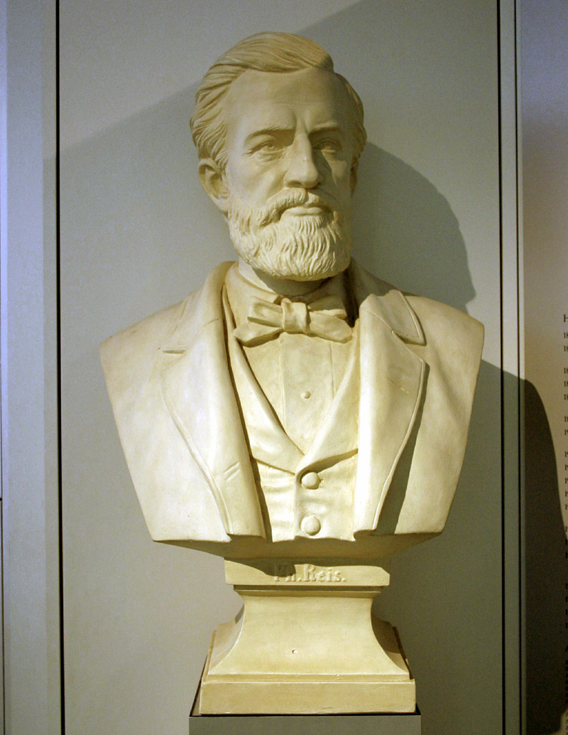 Philipp Reis (Johann Philipp Reis), deutscher Physiker und Erfinder, Büste im Deutschen Museum in München